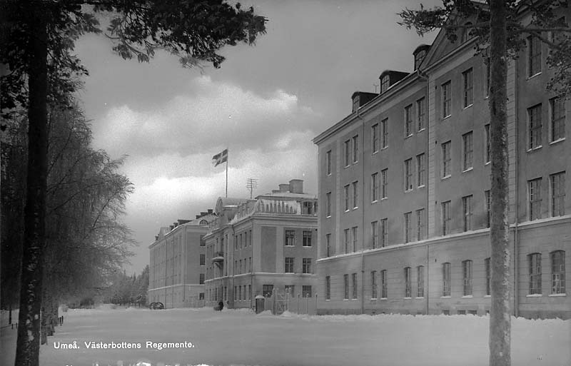 Västerbottens regemente.; Byggnadsverk; Försvarsväsen; Regemente